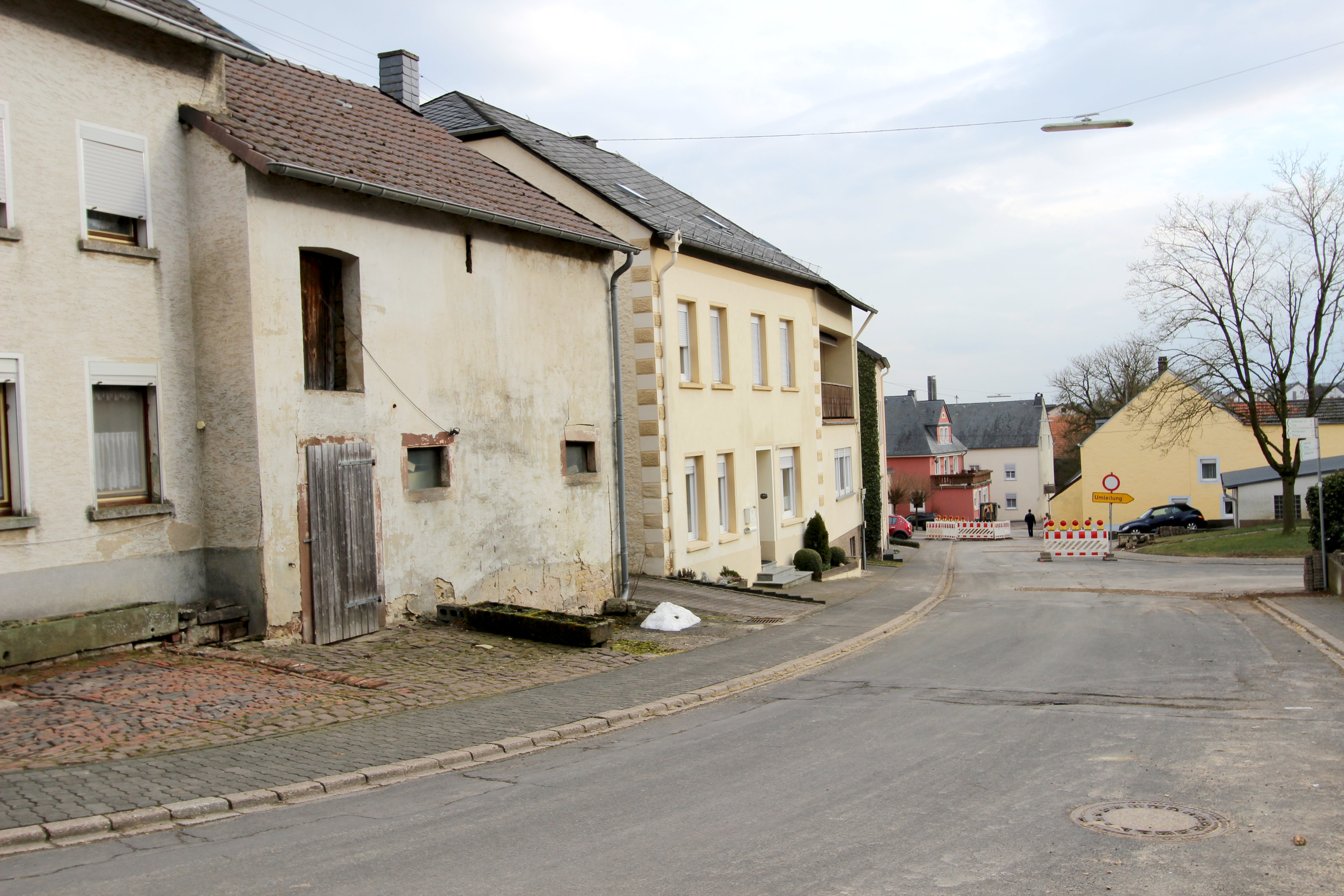 54634 Matzen, Donatusstraße. Die parallel zur abfallenden Straße ausgerichteten Bauernhäuser 11, 14 und 16 bilden mit dem kleinen, sich an Nr. 11 anlehnenden Bau Nr. 13 sowie dem vorspringenden, quer zur Straße stehenden Wohnhaus von Nr. 6 eine fast ungestört erhaltene und daher als Denkmalzone ausgewiesene Baugruppe. Der mit Abstand best erhaltene Teil des Oberdorfs Matzens gipfelt optisch in der erhöht gelegenen Filialkirche Sankt Donatus auf dem Kirchenhof. Aufnahme von 2018.